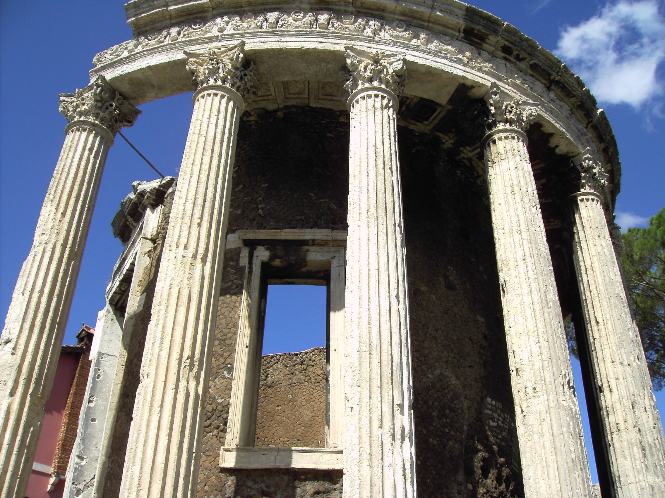 Temple of Vesta in Tivoli, Italy. / * Tivoli, tempio di Vesta.